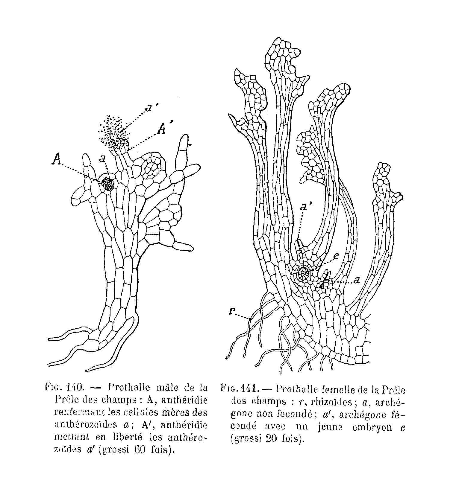 Prêle des champs - prothalles